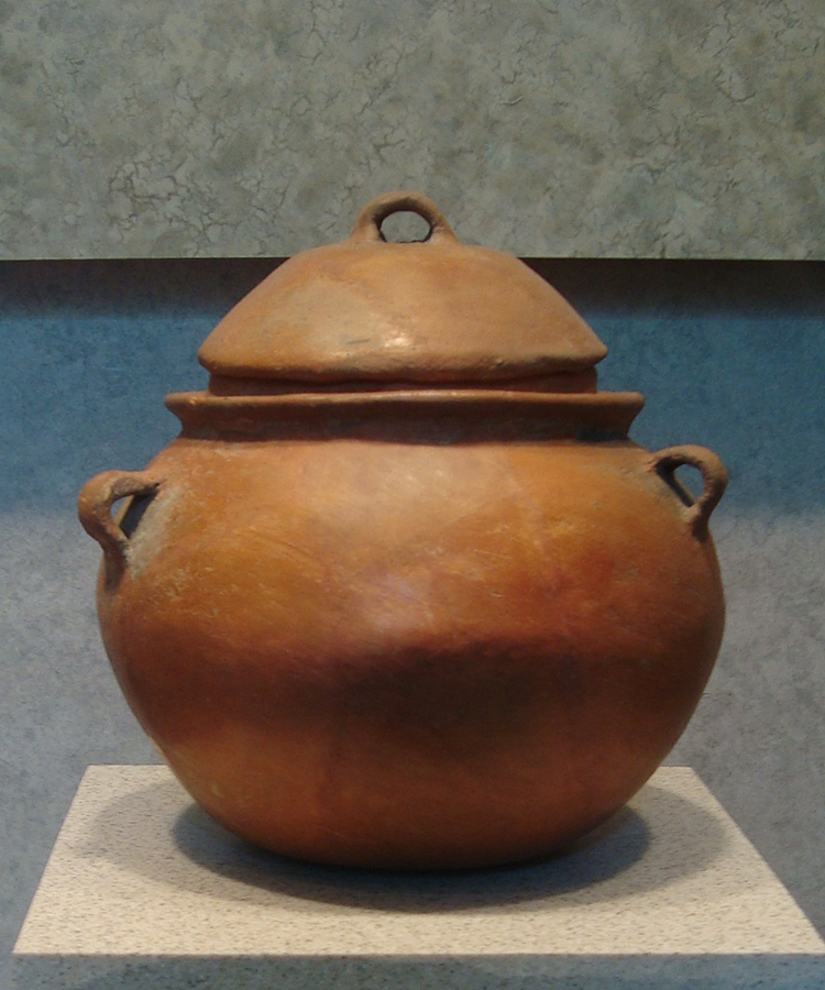 Vasija de cerámica estilo ñuiñe con tapa. Procede de Cerro de las Minas (México), cultura mixteca, período Clásico (ss. II-VII/VIII d. C.). Colección del MNA.